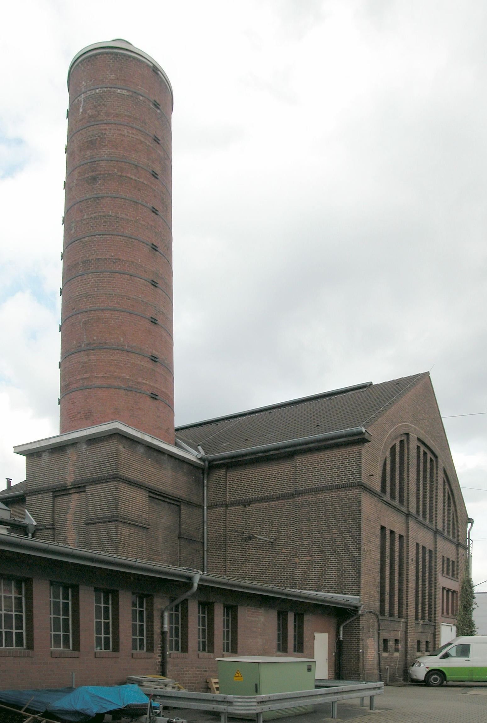 Mülheim an der Ruhr, Medl-Heizwerk, Blickrichtung NO Standortkoordinaten: 51°25′39.18″N 6°52′0.01″E / 51.42755°N 6.8666694°E